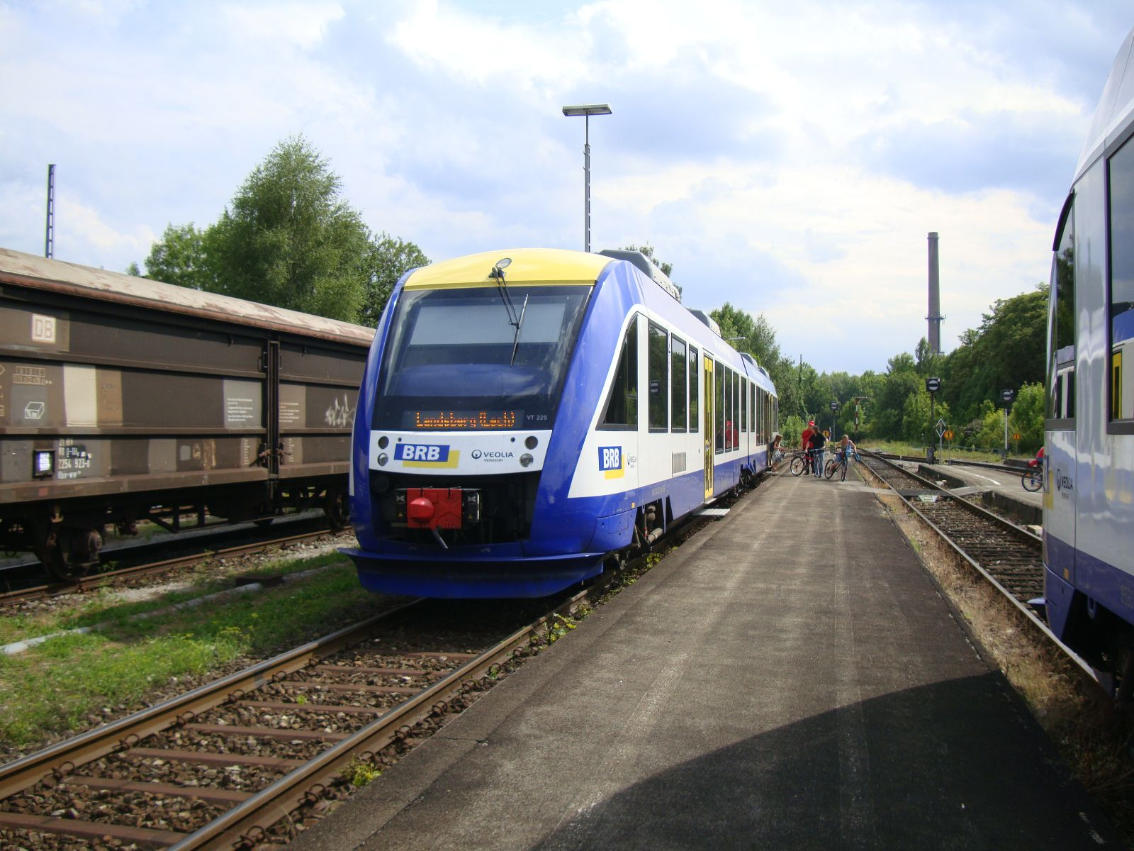 VT 225 "Peiting" im Bahnhof Schongau anlässlich einer Sonderfahrt auf der "Fuchstalbahn" Schongau - Landsberg(Lech). Daneben steht VT 212 "Mering" zur Abfahrt Richtung Weilheim und Augsburg bereit